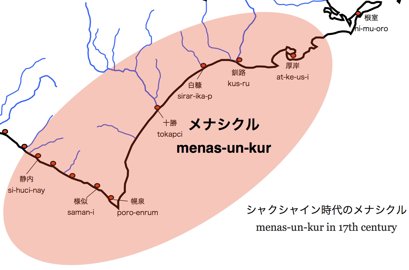 17世紀におけるメナシクルの地図